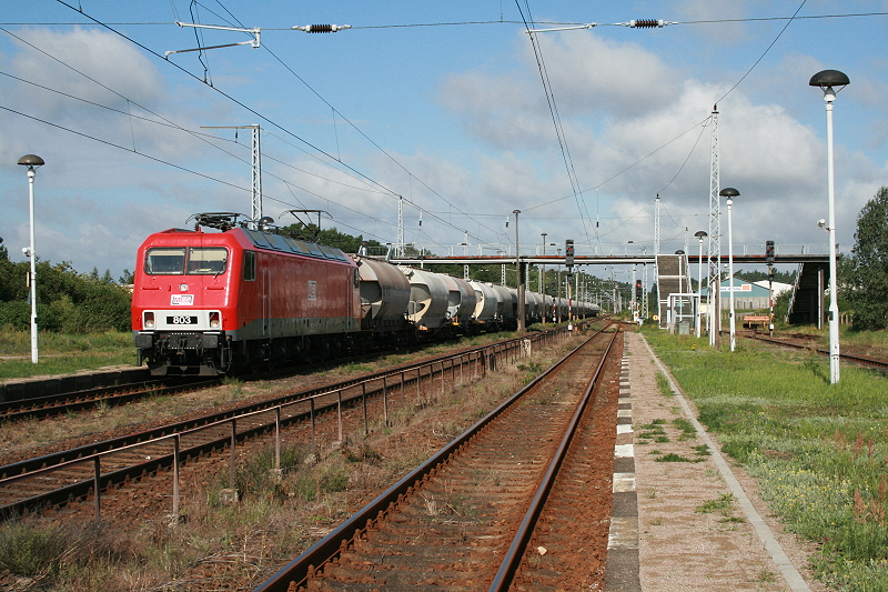 MEG 803 durchfährt den Bahnhof Kargow (Meckl)